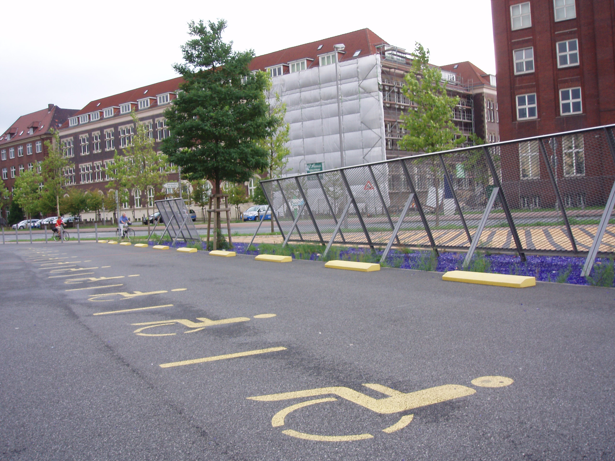 Parkplätze am Space Center in Bremen